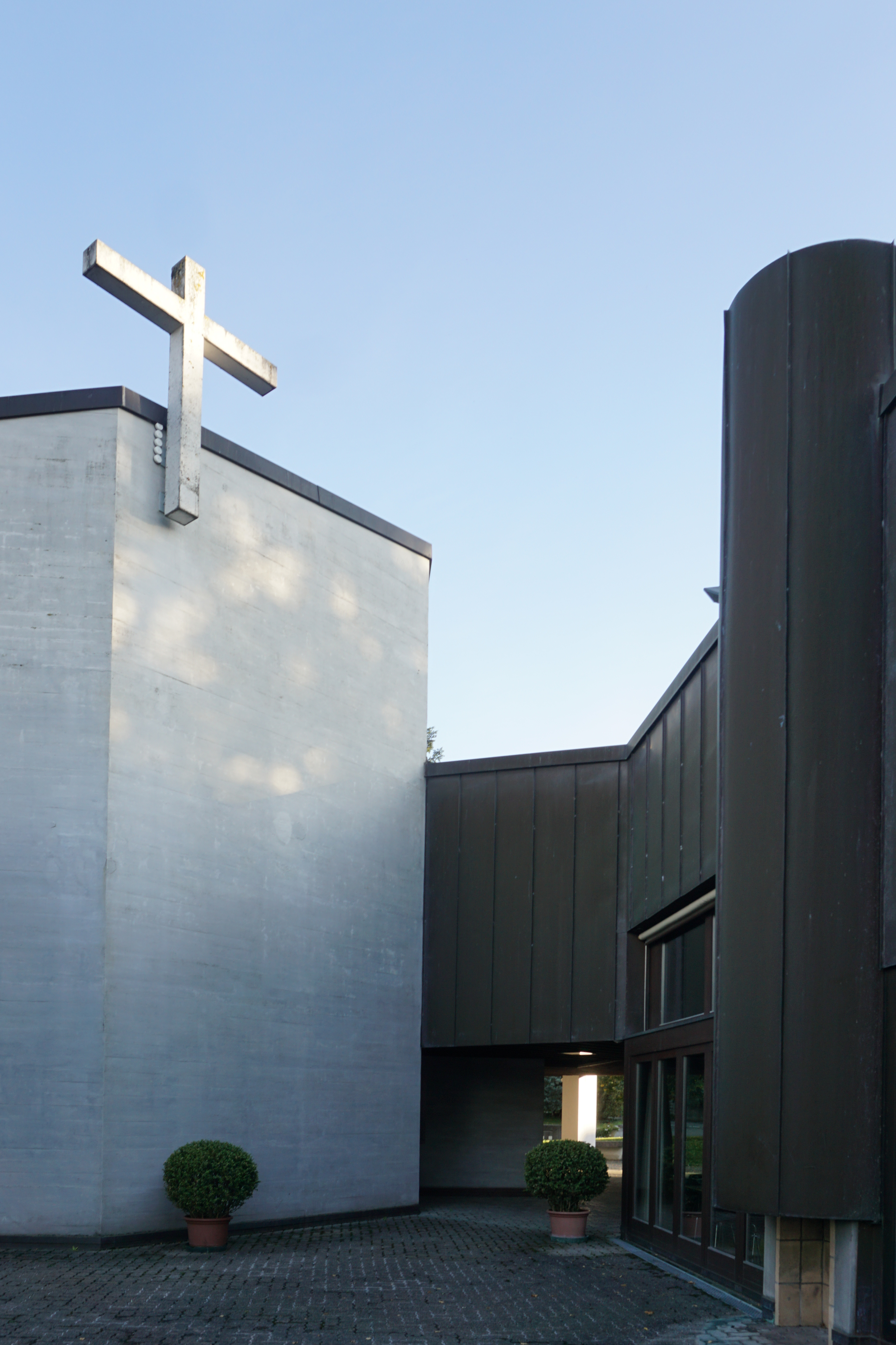 Bruder Klaus Kirche Spiez, Innenhof